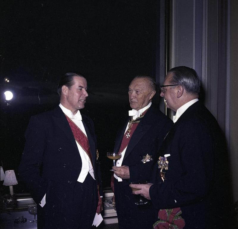 Empfang für das thailändische Königspaar auf dem Petersberg